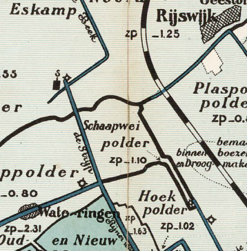 Schaapweipolder